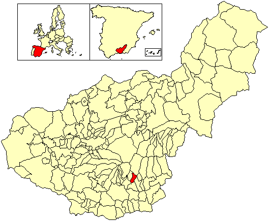 Situación del término municipal de Busquístar respecto a la provincia de Granada, en España.